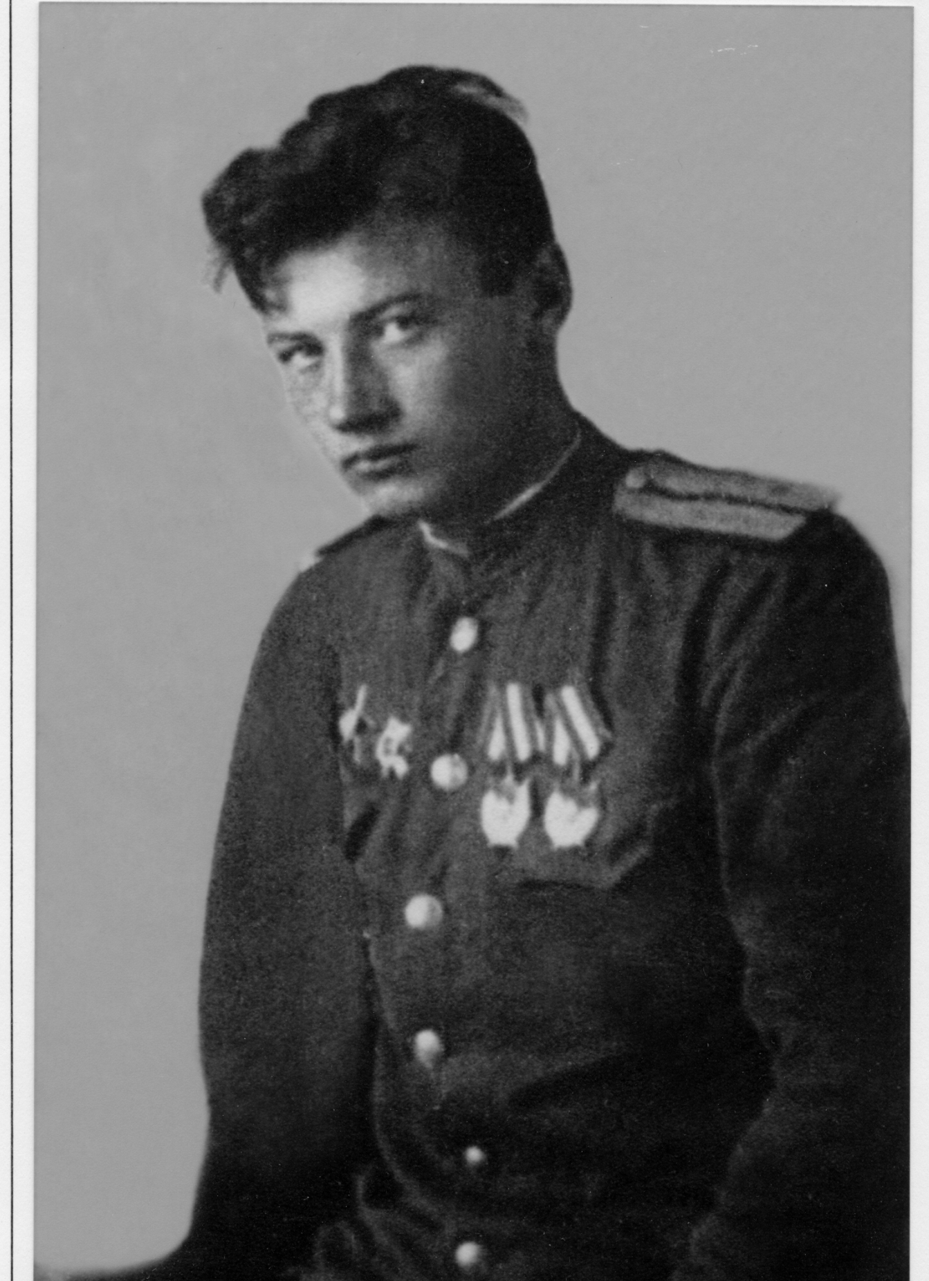 это настоящая фотография